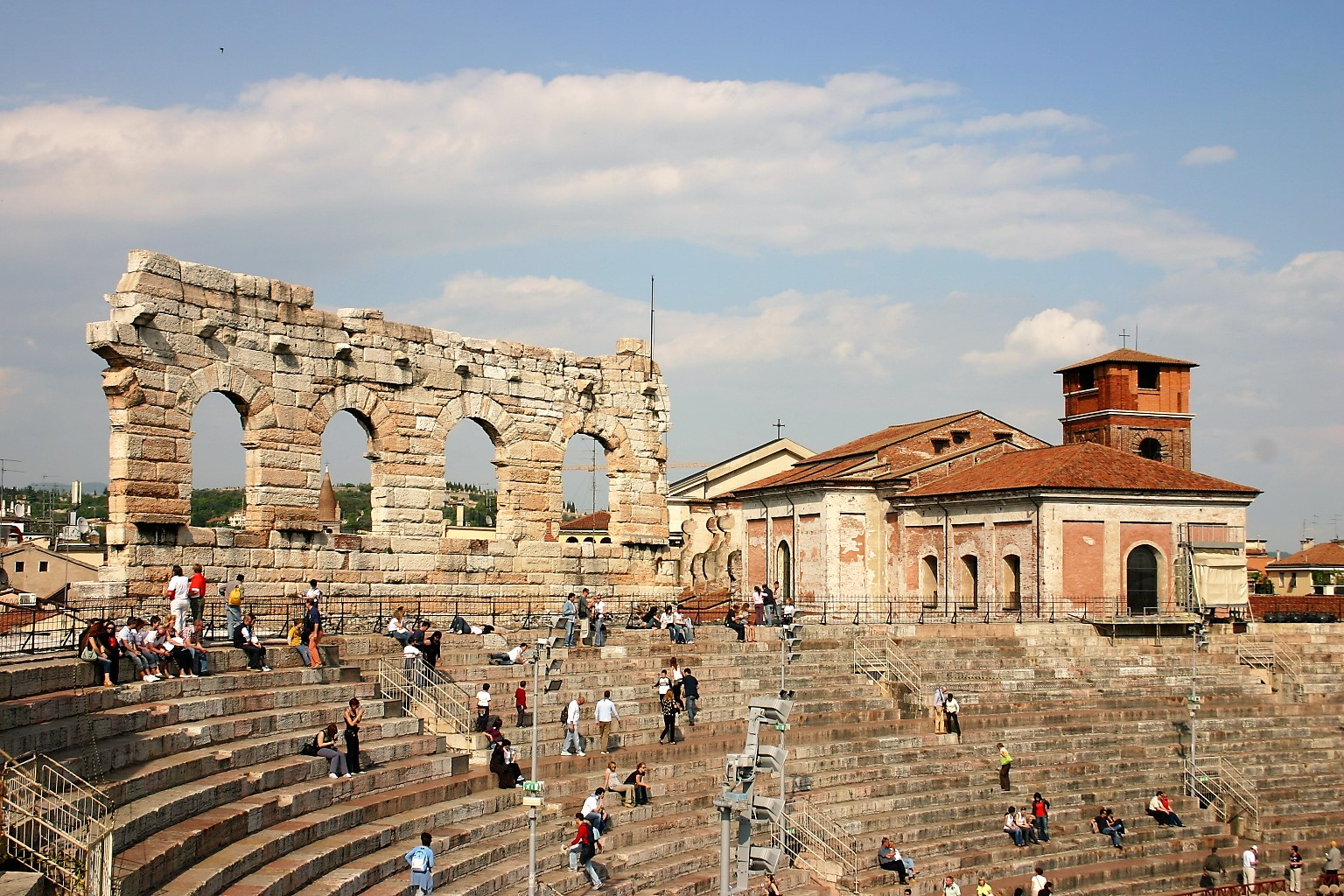 Mauern, Rundbögen: Reste römischer Baukunst.